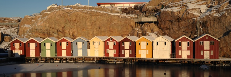 Ängebackens färgglada klassiska sjöbodsrad, Smögen